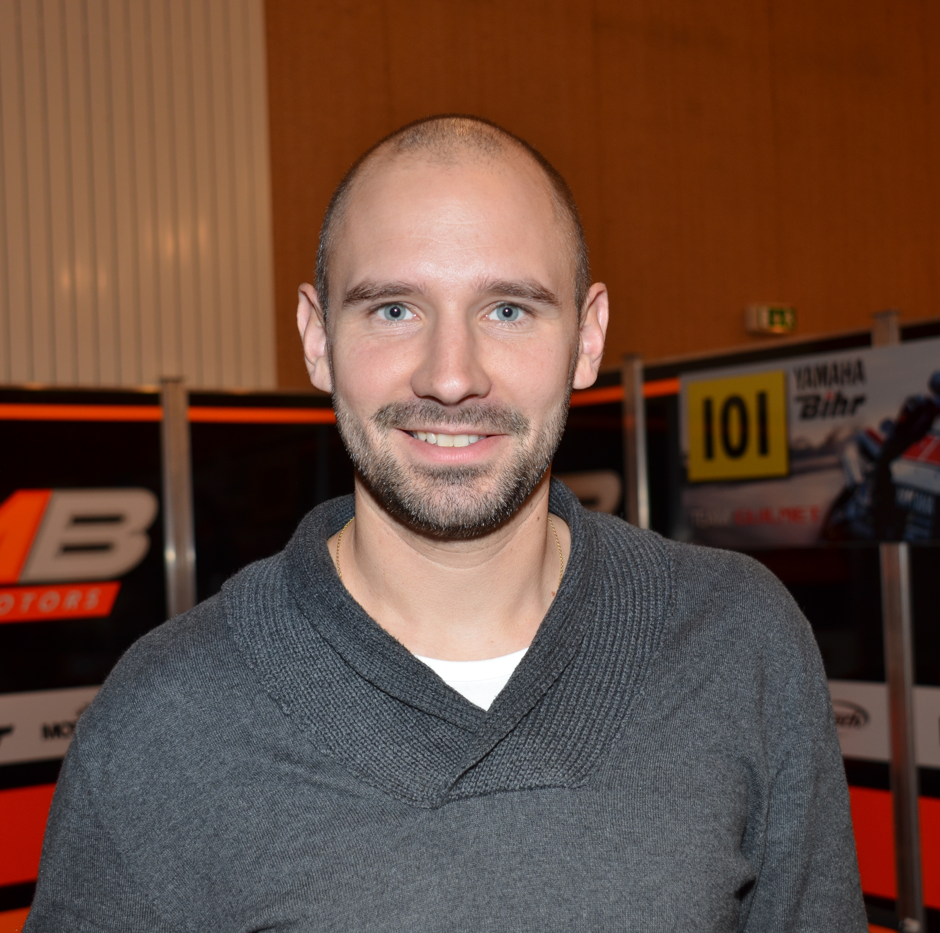 Anthony Delhalle à Montfort-le-Gesnois en Octobre 2015